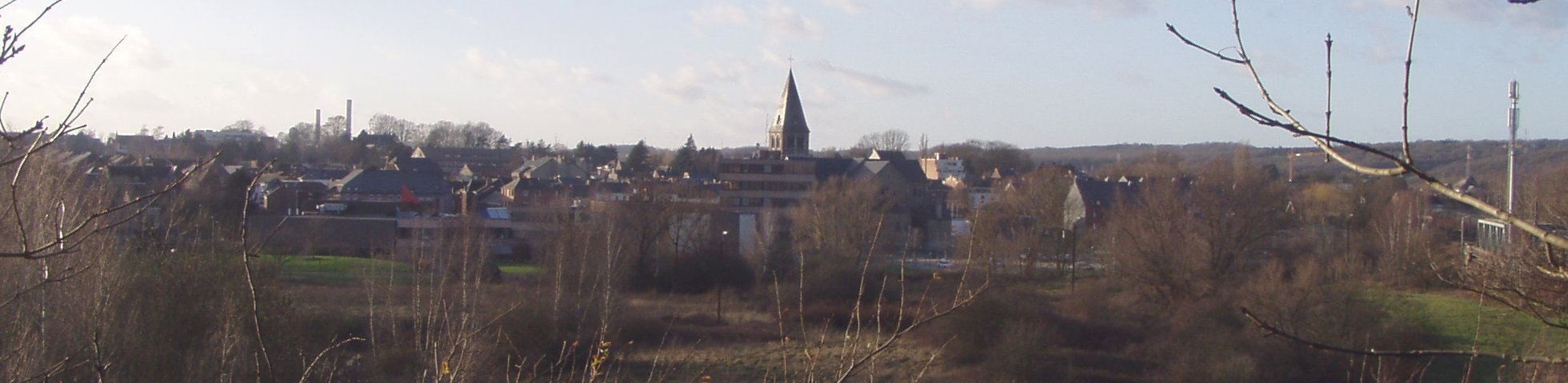 Le chemin menant au Cimetière Français donne un bon point de vue sur le centre d'Auvelais et l'Eglise St Victor